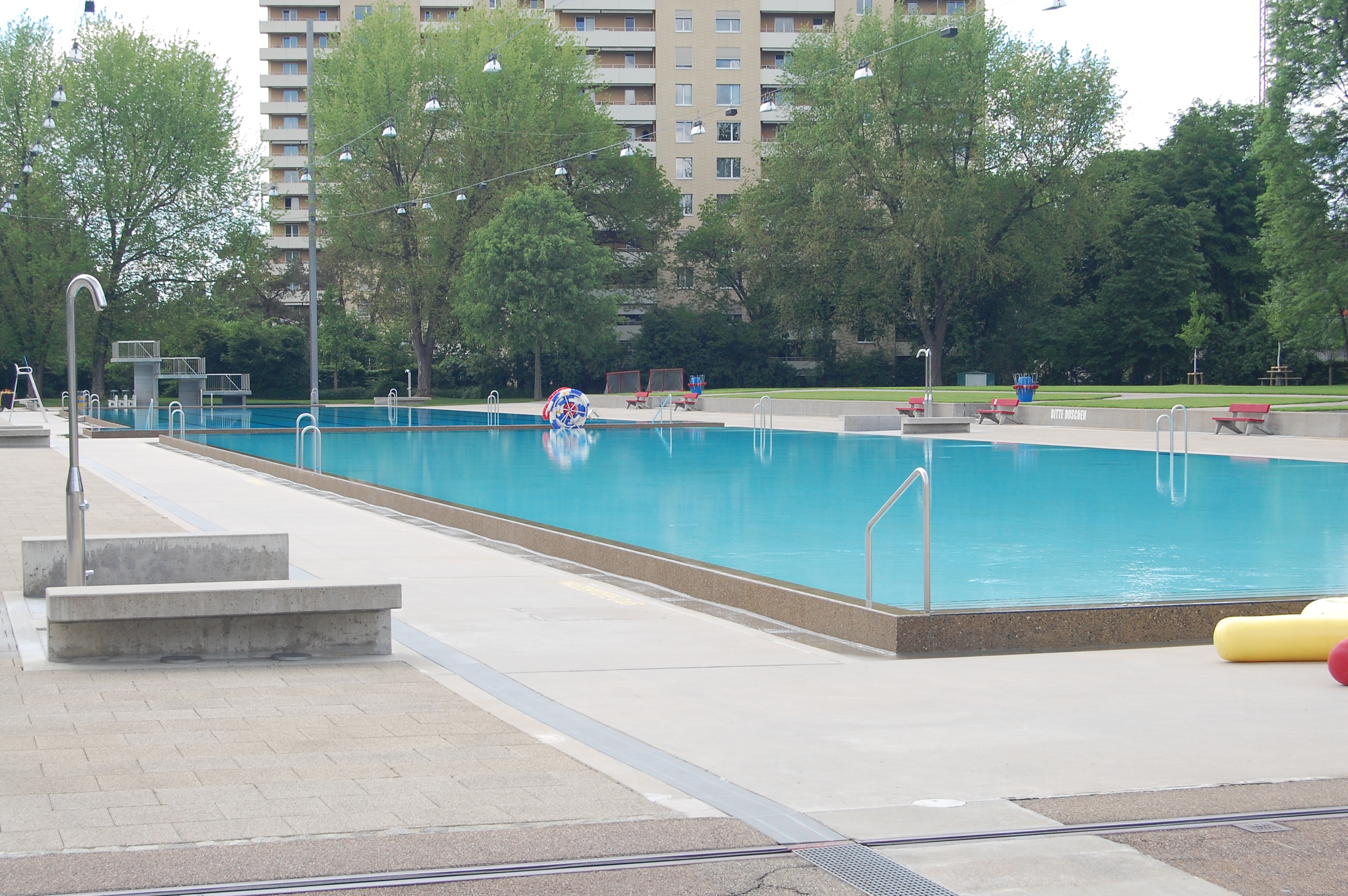 Eglisee Basel, Schwimmbecken und Sprungturm